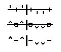 Mögliche Notation von Salzedo-Zeichen